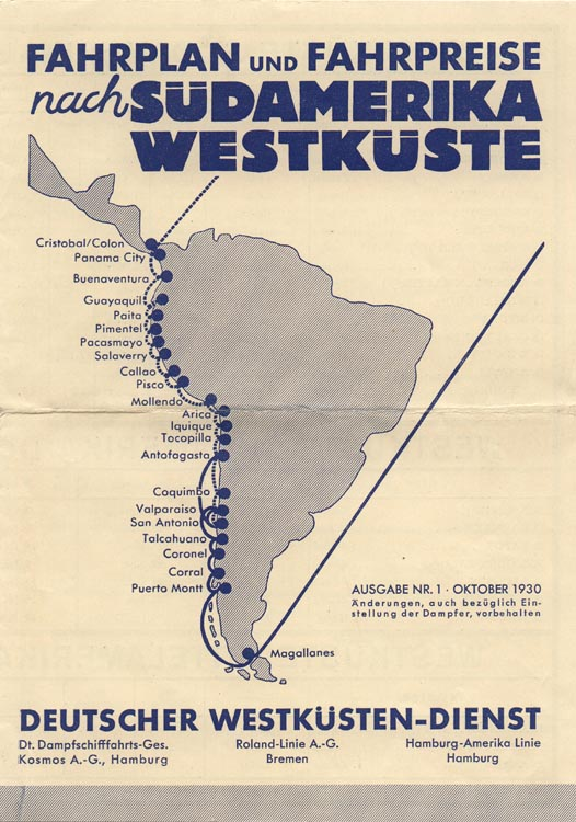 Titel des Deutschen Westküsten-Dienst Fahrplans 1930